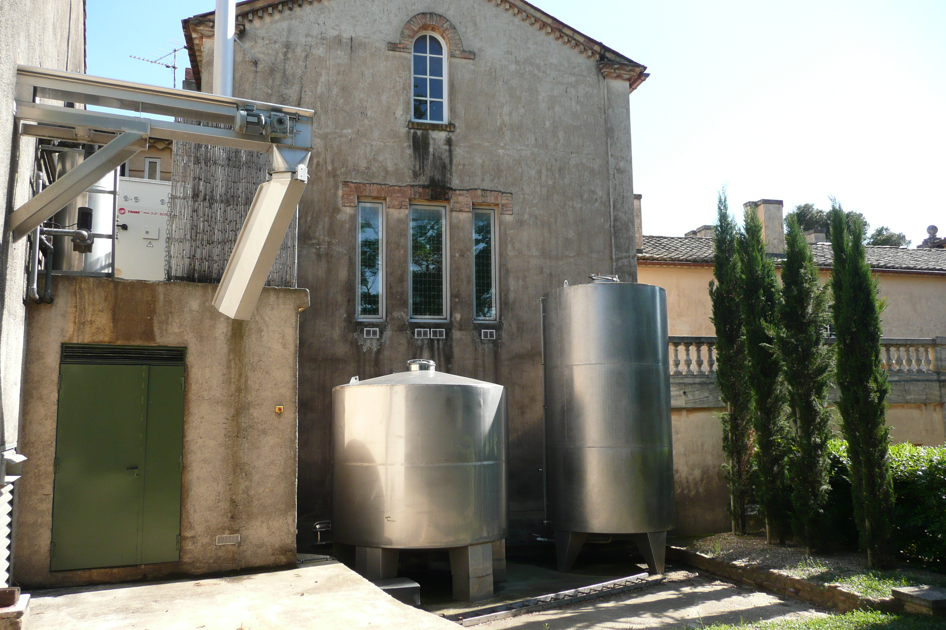 Cave vinicole près du château La Nerfe à environ 2.2 km de Châteauneuf-du-Pape.